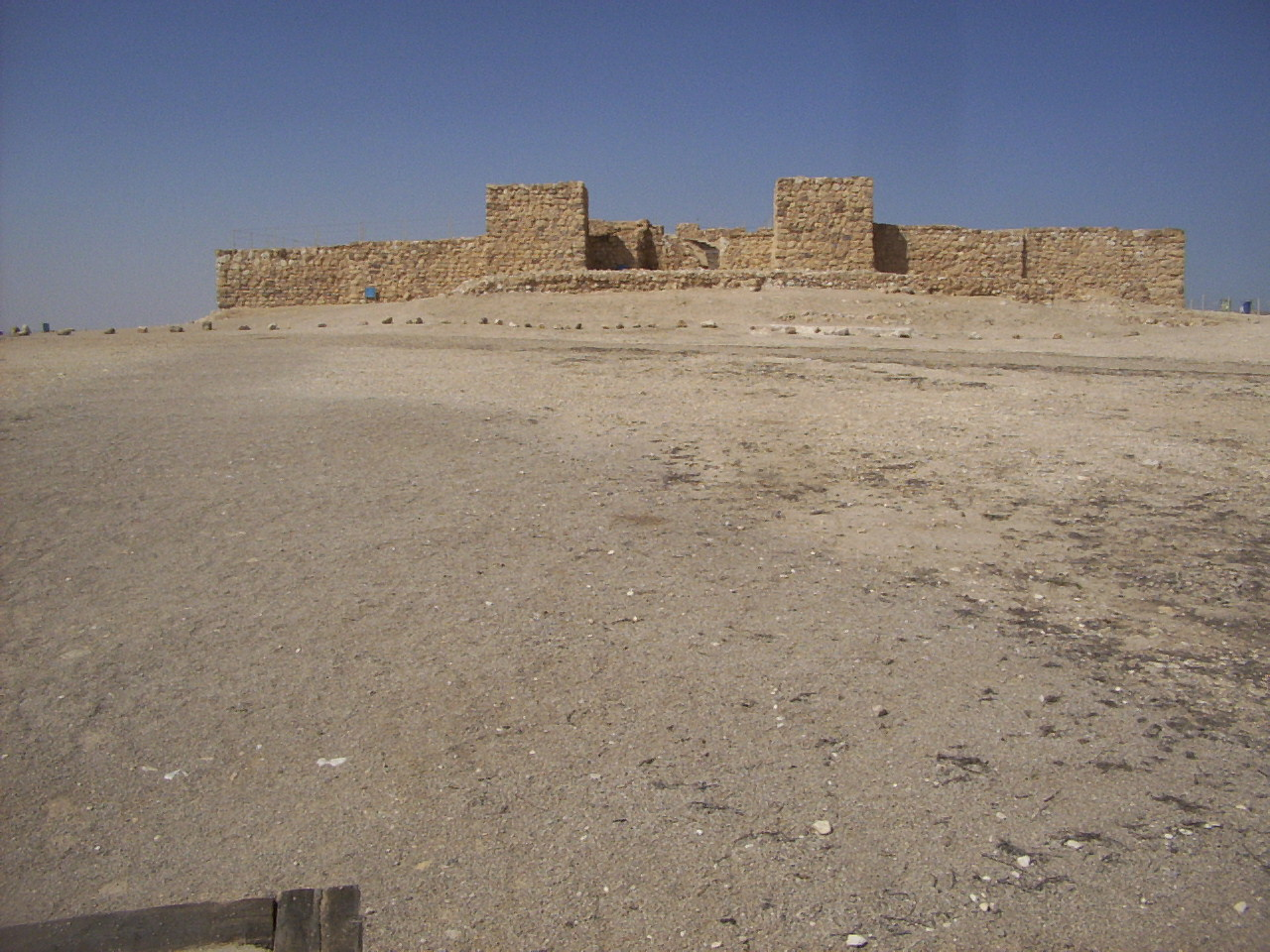 Remparts d'Arad, entrée fortifiée, Arad, Israël